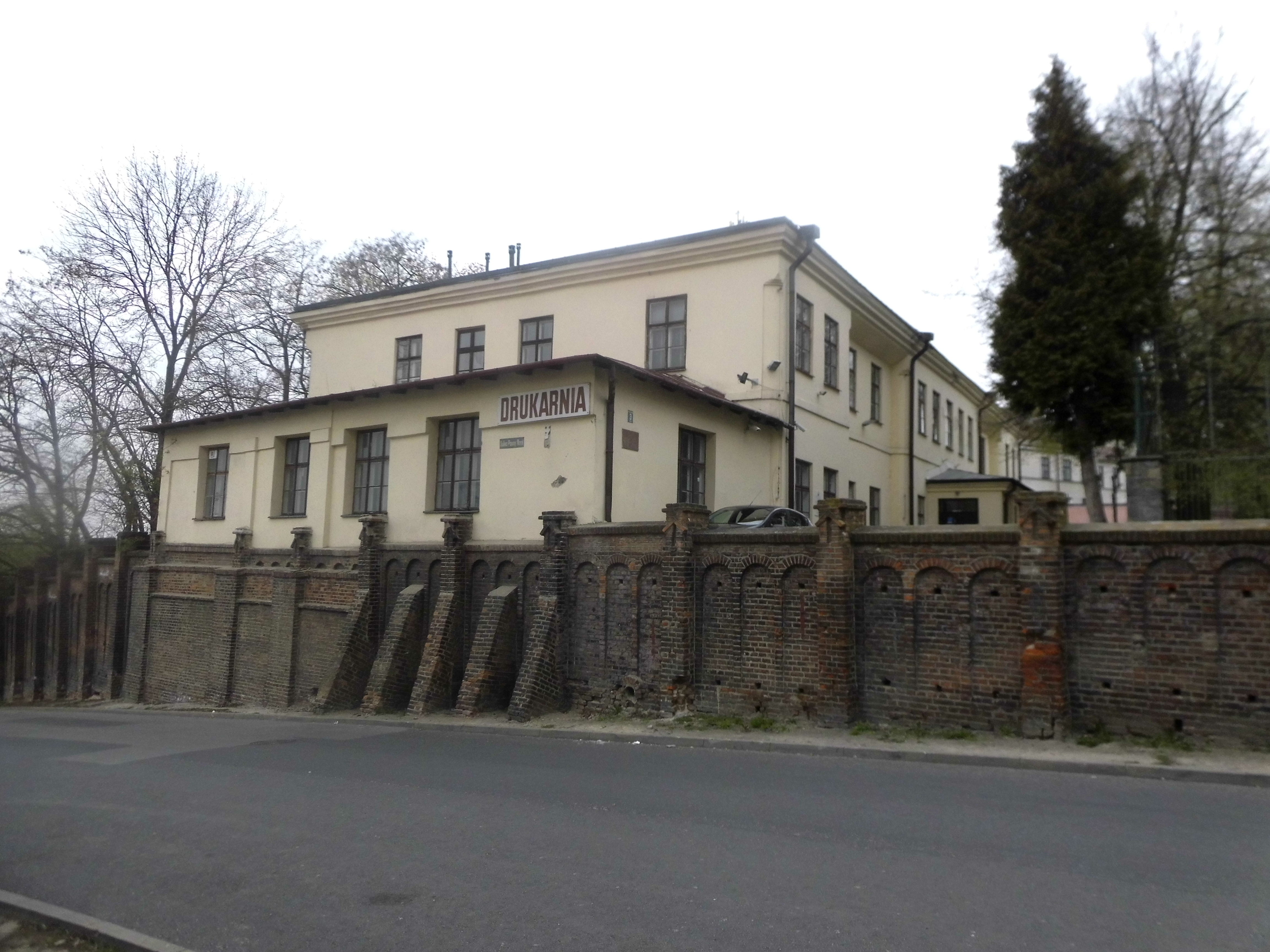 Budynek, gdzie mieści się Wojewódzki Ośrodek Kultury.